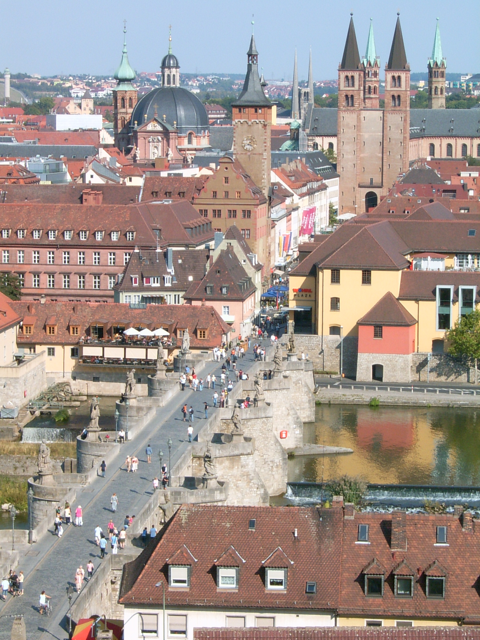 Alte Mainbruecke, Kiliansdom und Rathaus in Wuerzburg. Die Aufnahme ist von Marienberg aus gemacht.